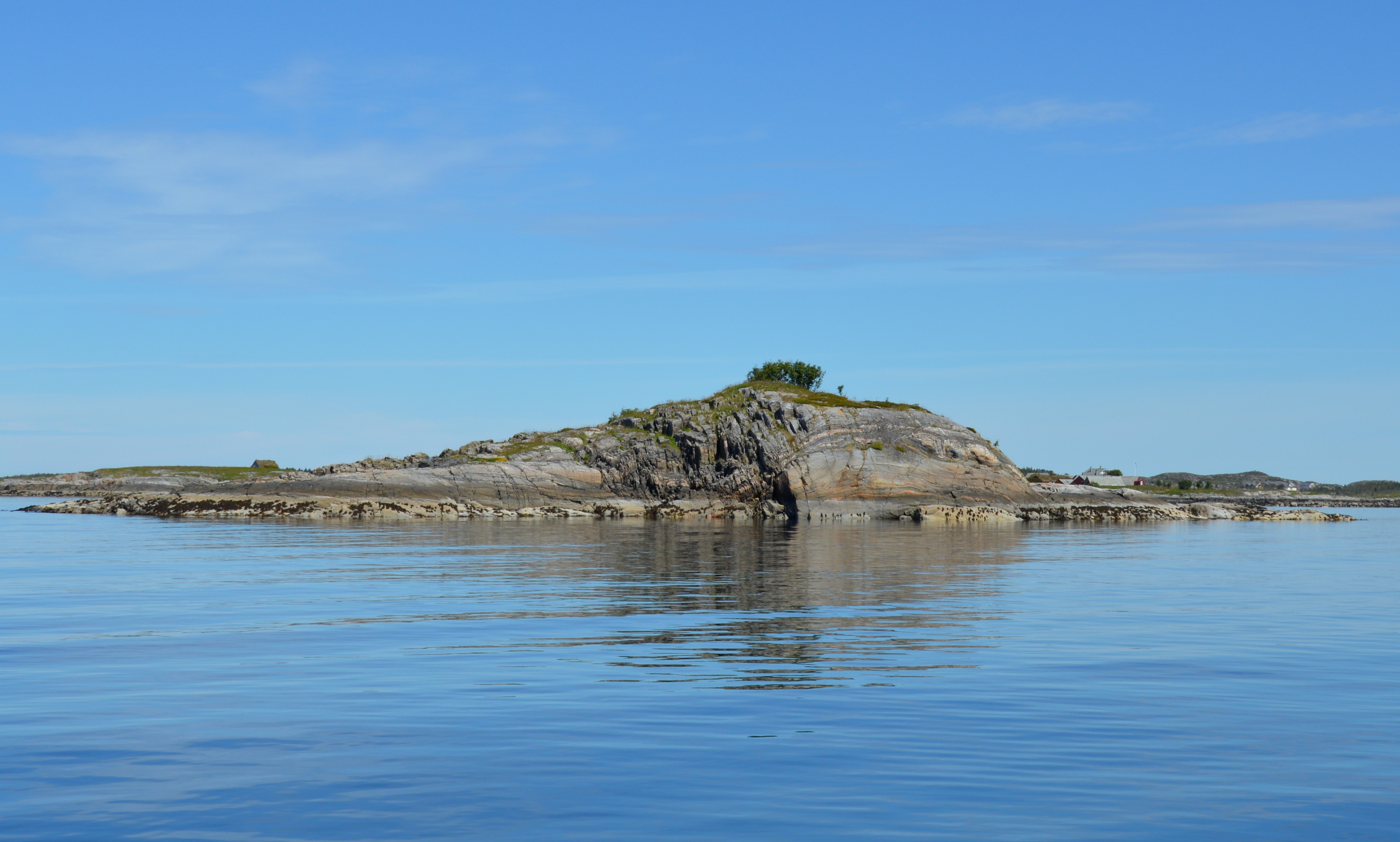 Seiskjæret